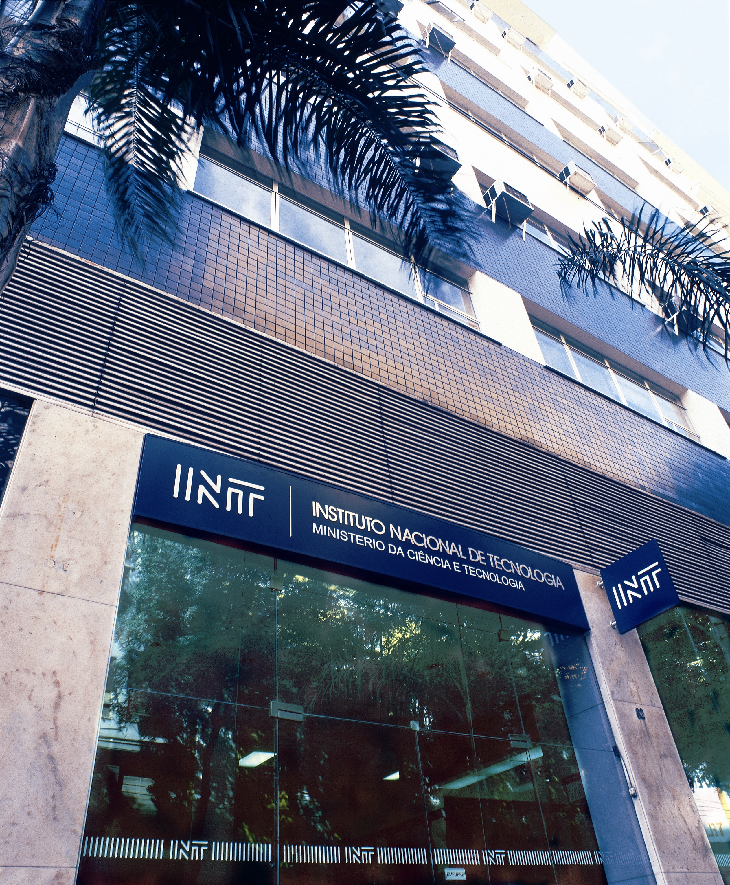 Fachada do Instituto Nacional de Tecnologia